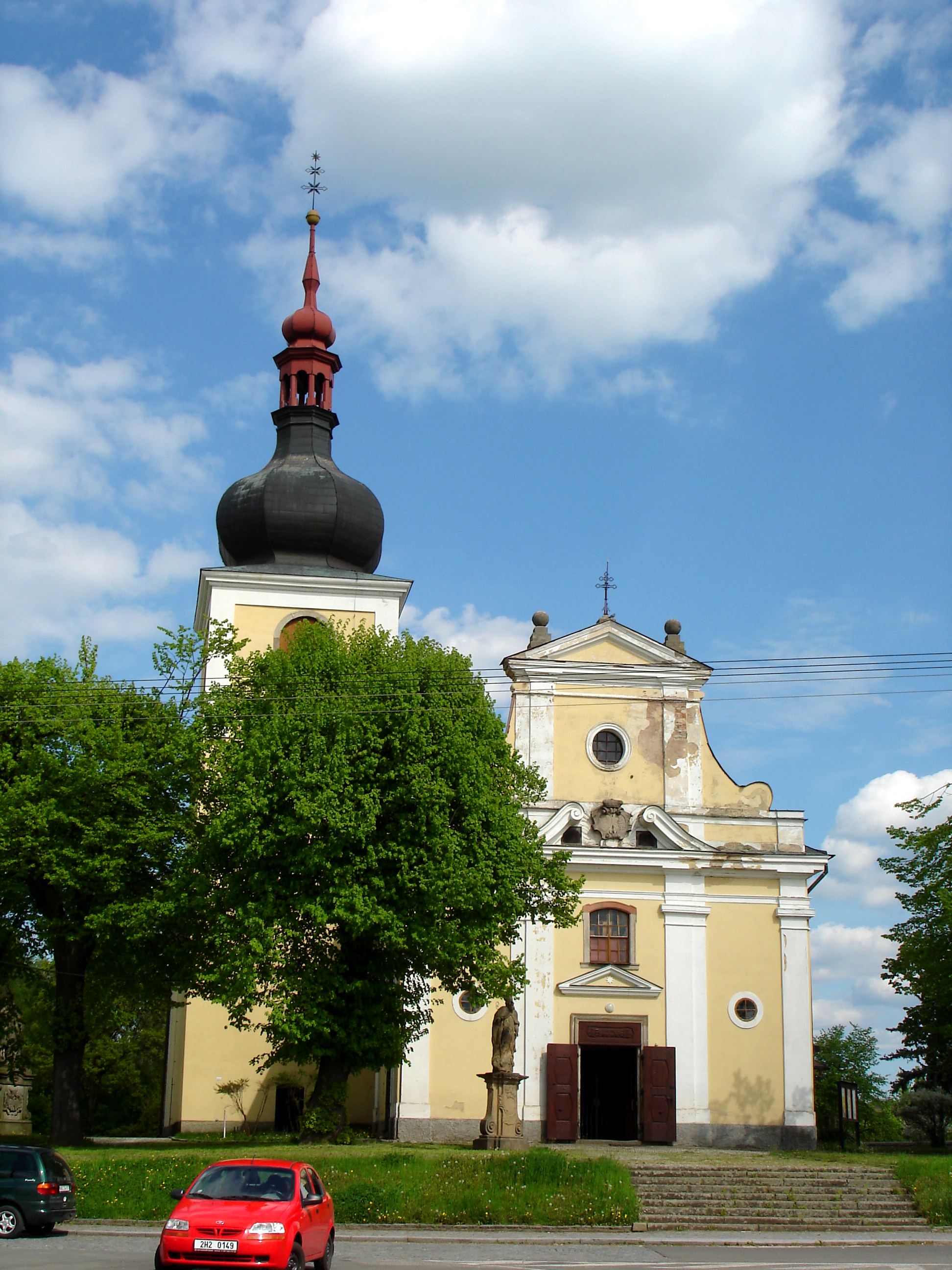 Tschechien: Kirche in Česká Skalice (Ortsteil Malá Skalice)